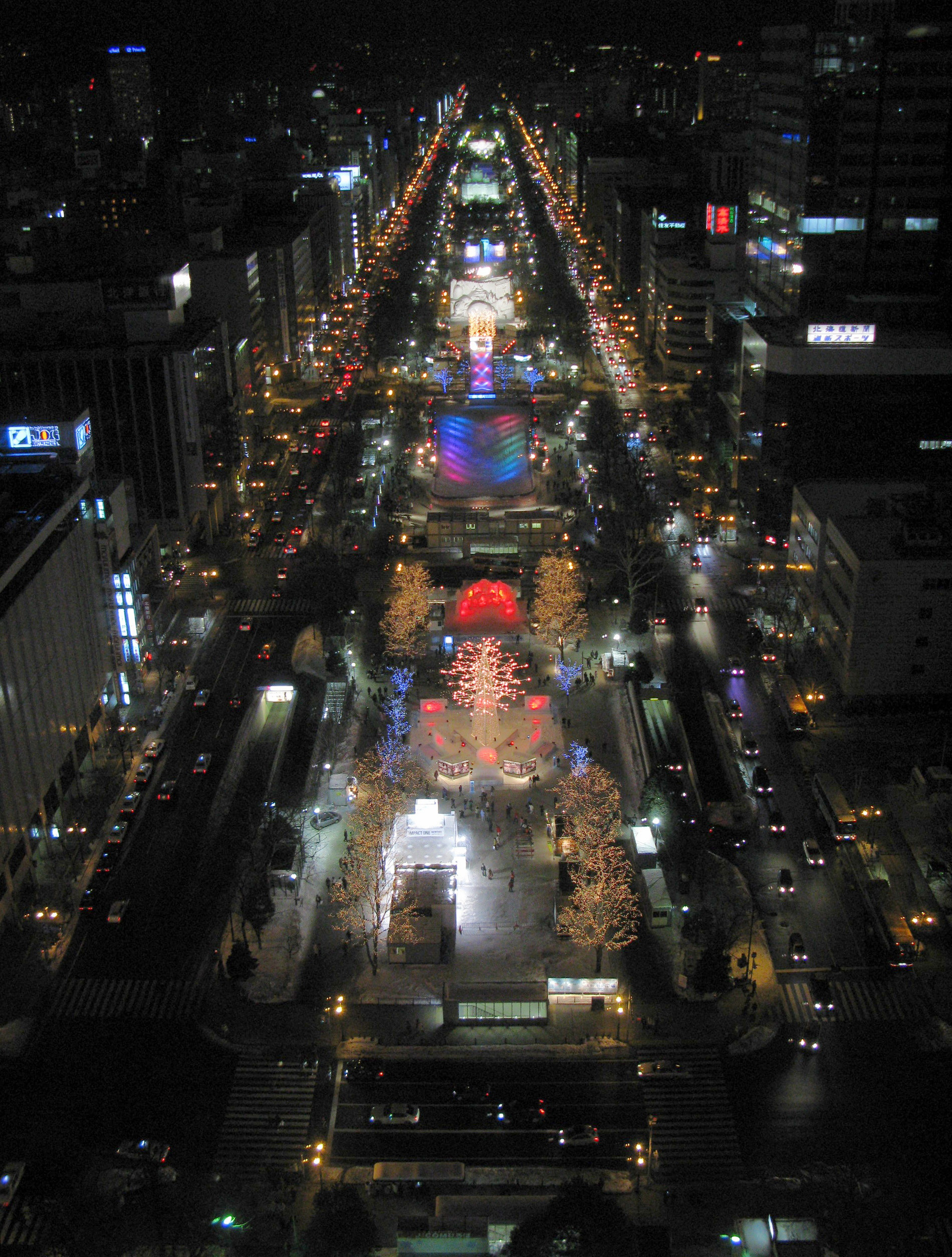 さっぽろ雪まつり夜の大通り会場全景（テレビ塔展望台より撮影）（北海道札幌市中央区）